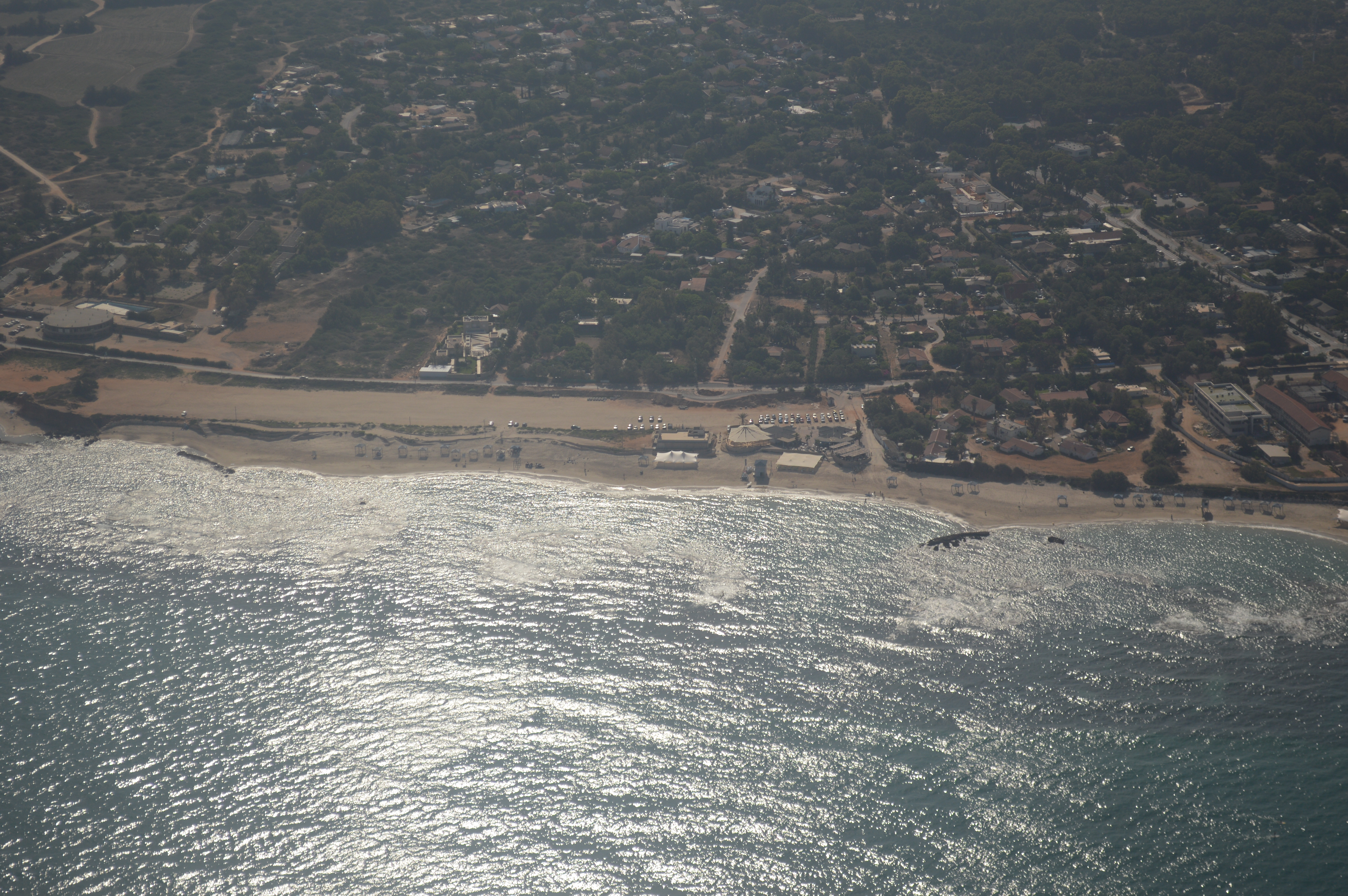 צילום אוויר של חוף מכמורת